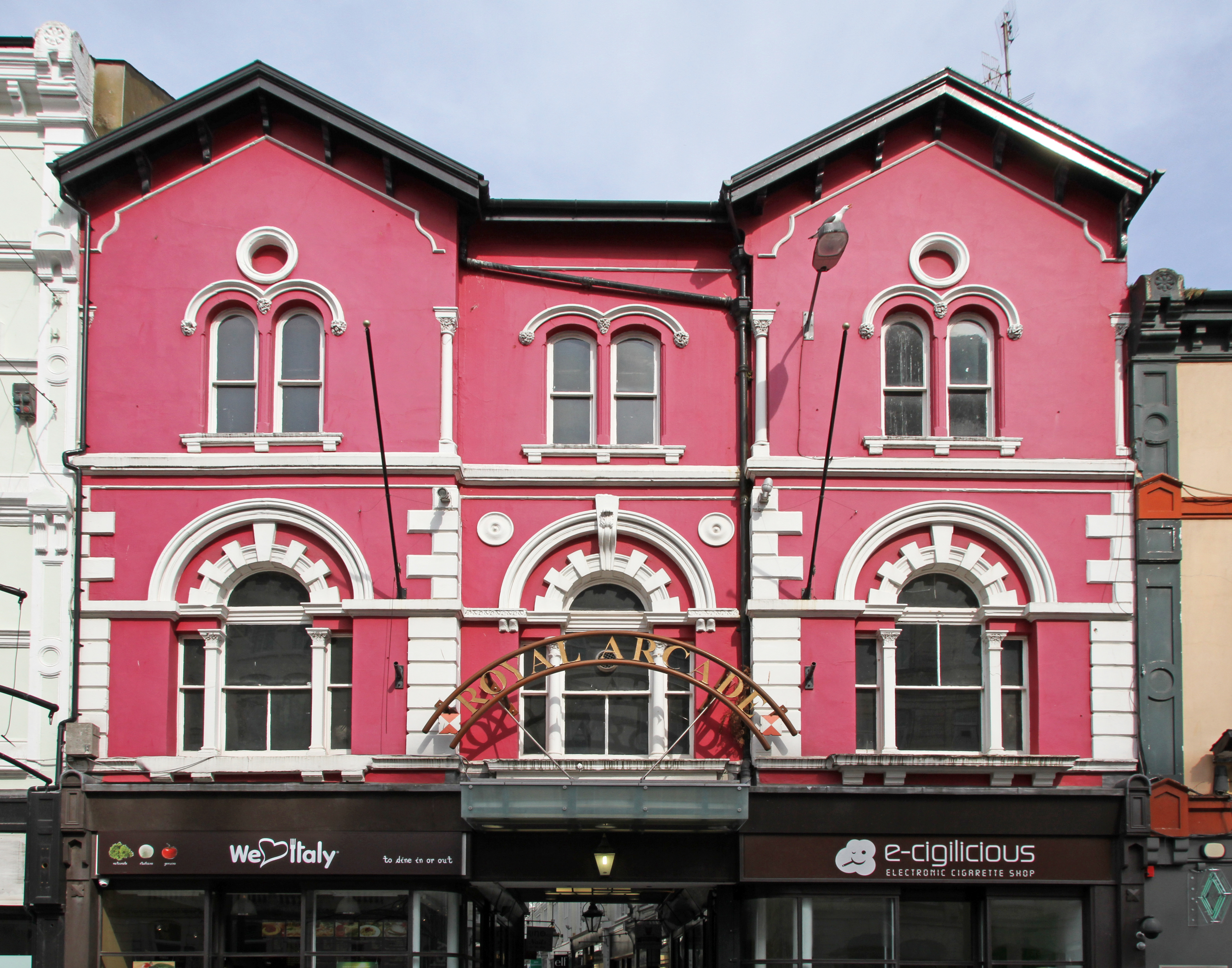 Royal Arcade Cardiff